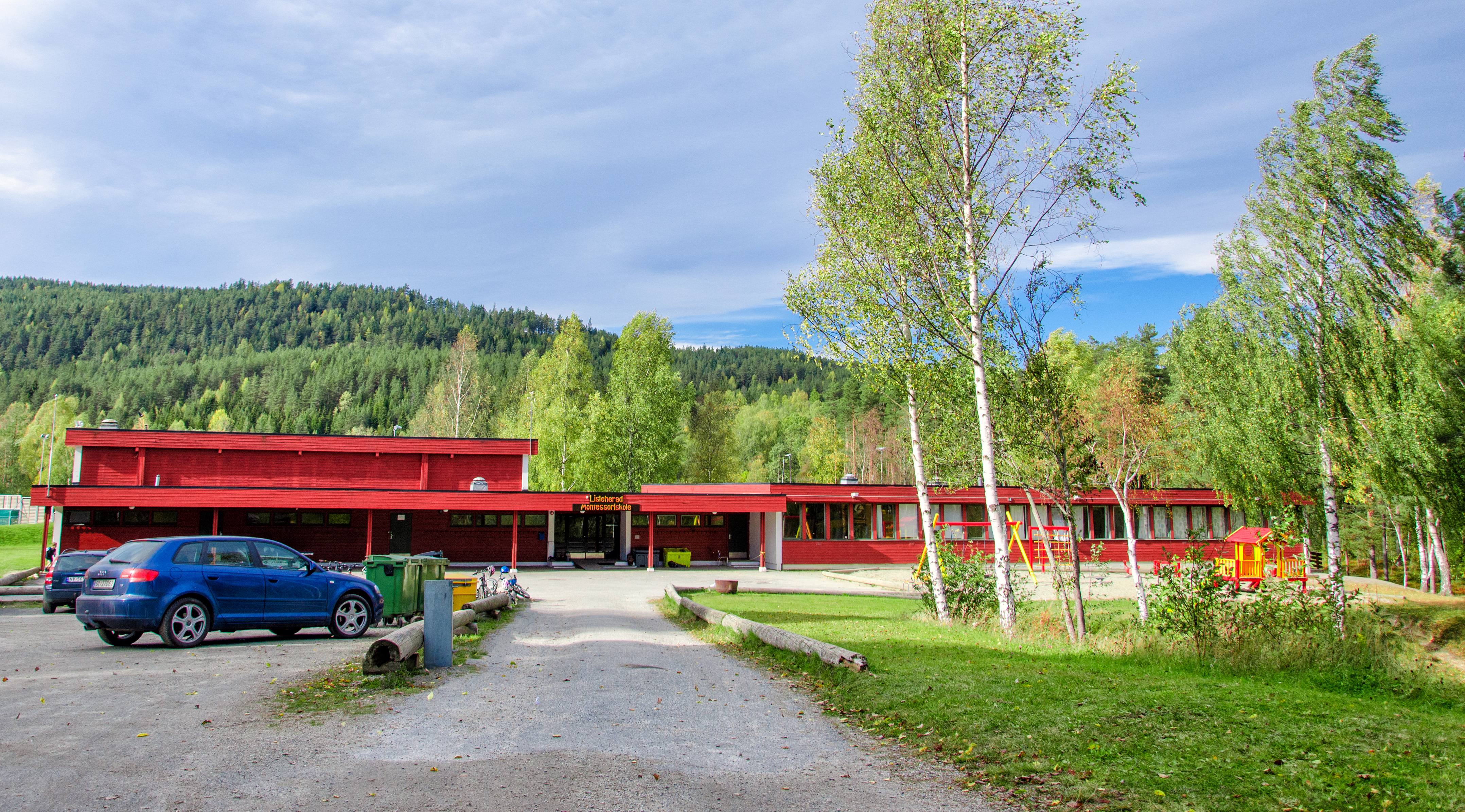 Lisleherad skole, nedlagt som offentlig skole 2014. Nå Lisleherad Montessoriskole.